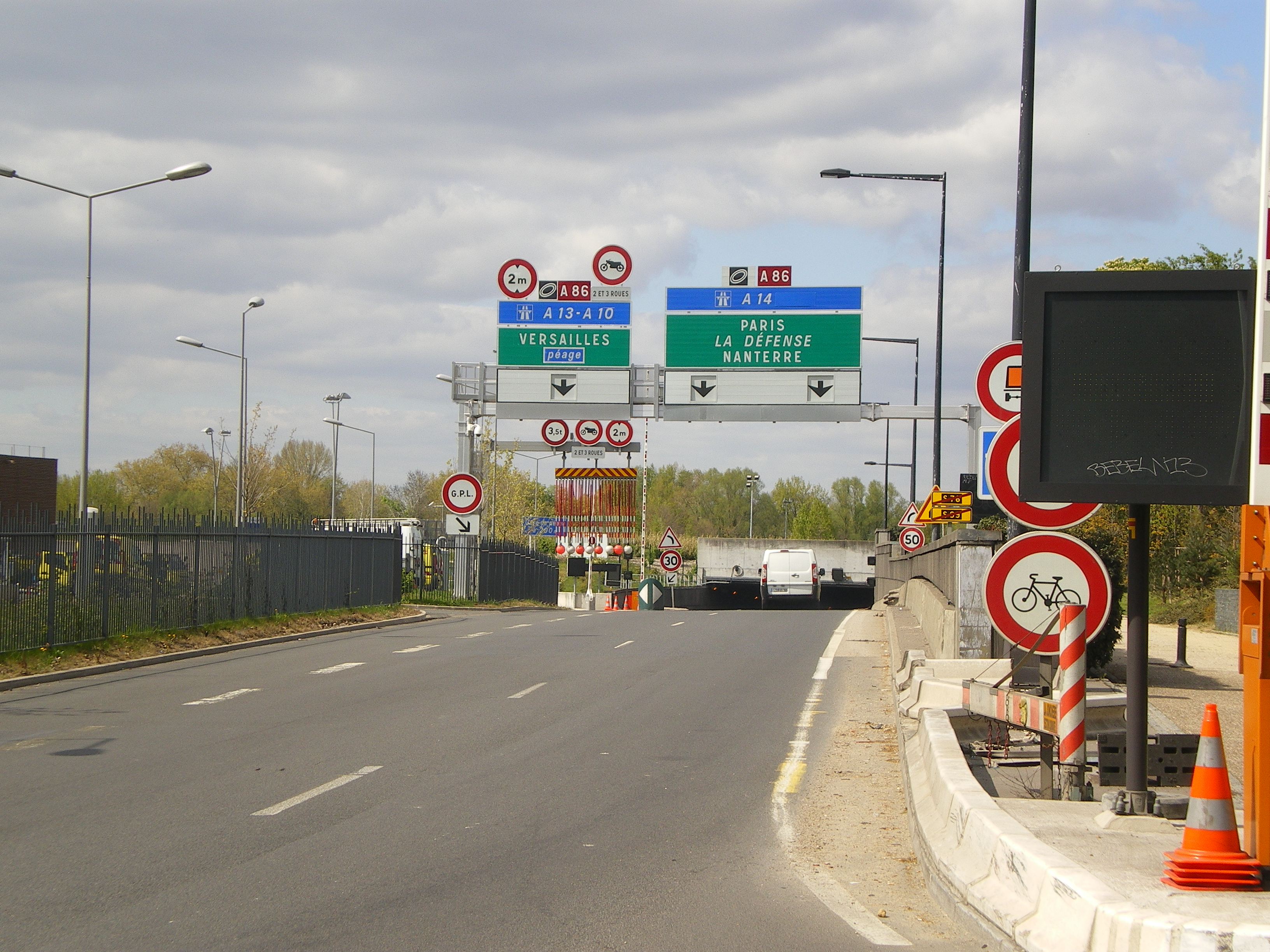 Voies d'accès au duplex A86 et au tunnel de Rueil-Malmaison de l'A86. On peut voir sur le panneau les catégories d'usager autorisés à utiliser le duplex